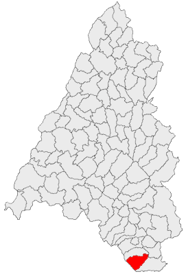 Categorie:Hărţi ale judeţului Bihor